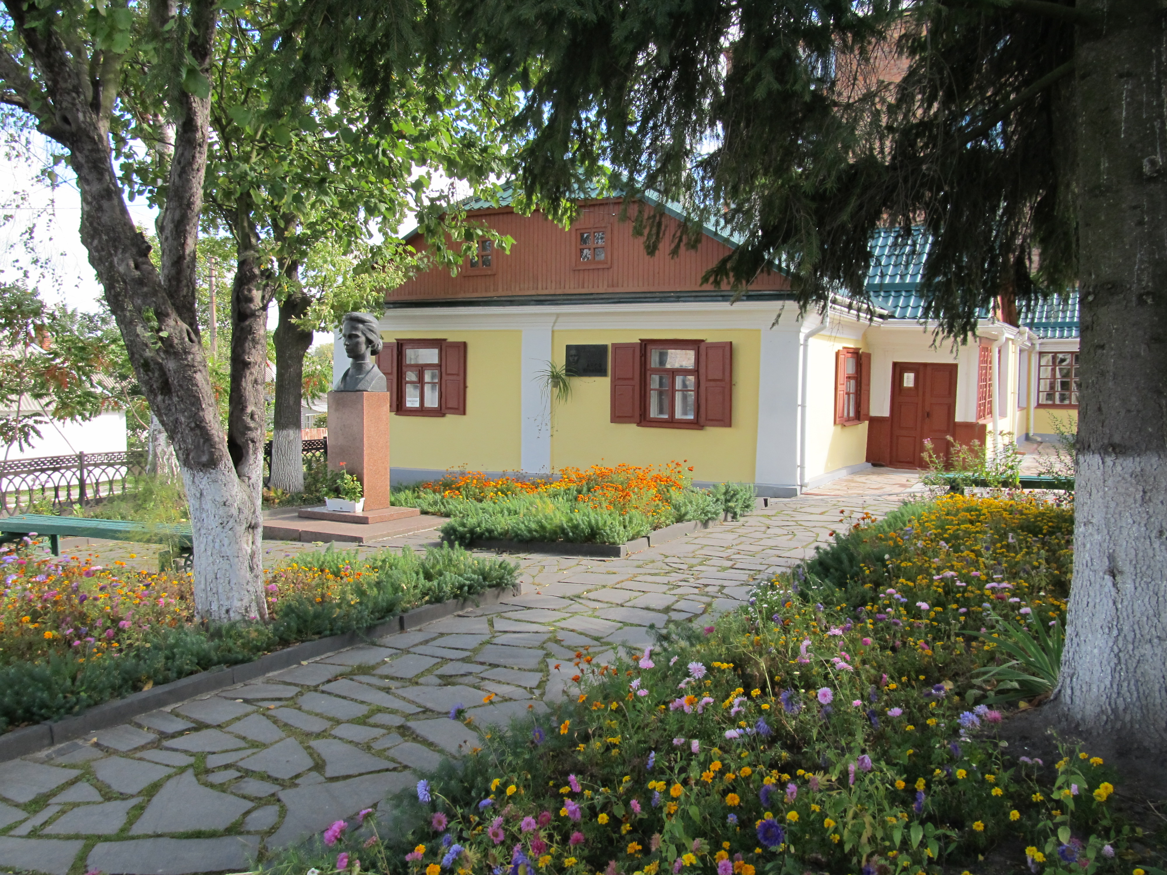 Будинок, в якому народилася і жила поетеса та громадська діячка Леся Українка (літературно — меморіальний музей Лесі Українки).